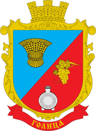 Герб села Голиця